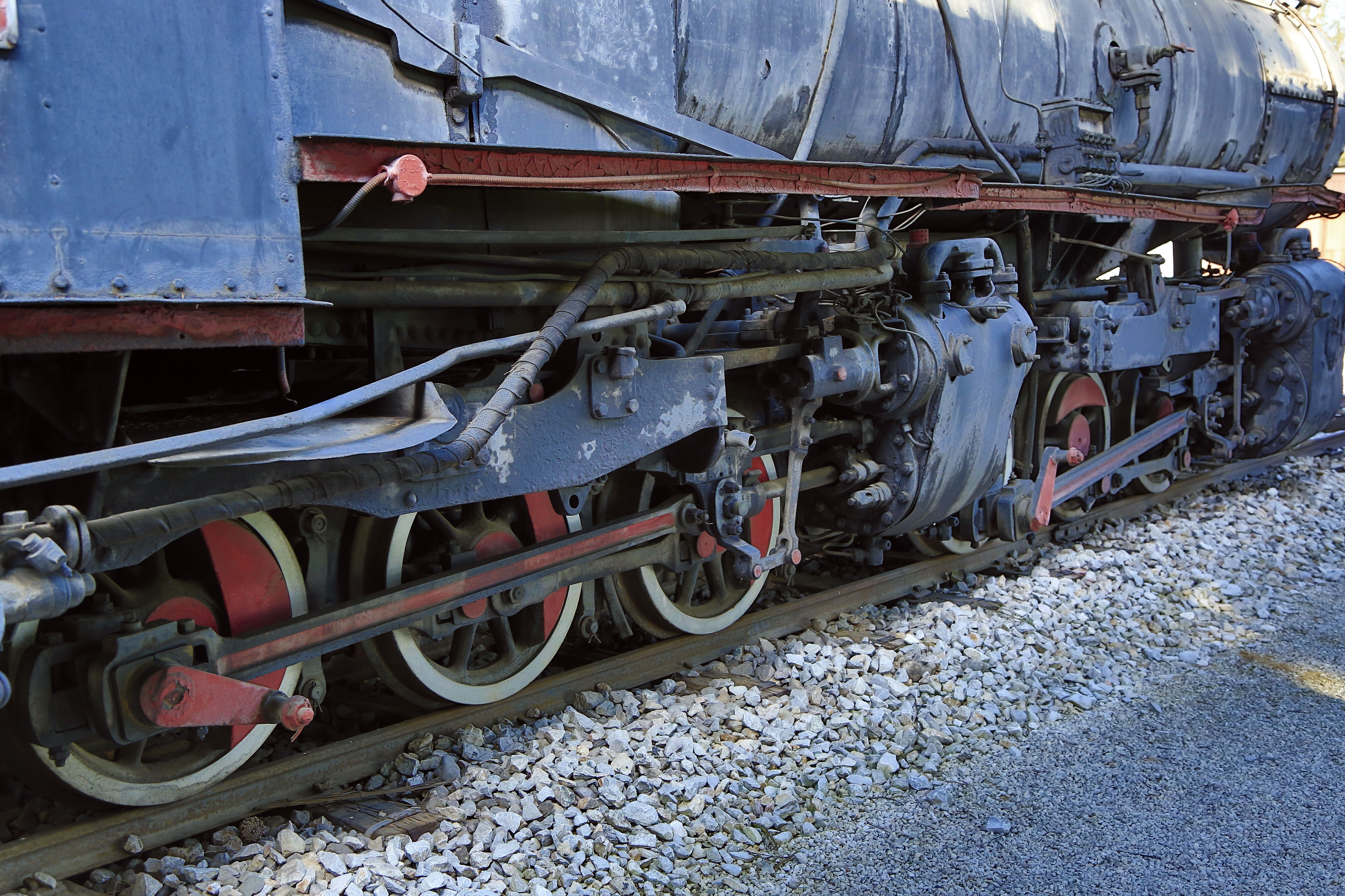 Hinten das festgelagerte Hoch-, vorn das schwenkbare Niederdrucktriebwerk. Die Schwingenstangen sind allerdings ausgebaut.